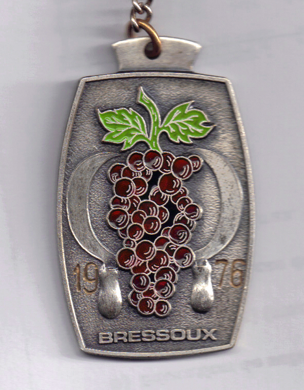 Amblème de la commune de Bressoux, Liège, Belgique 1976